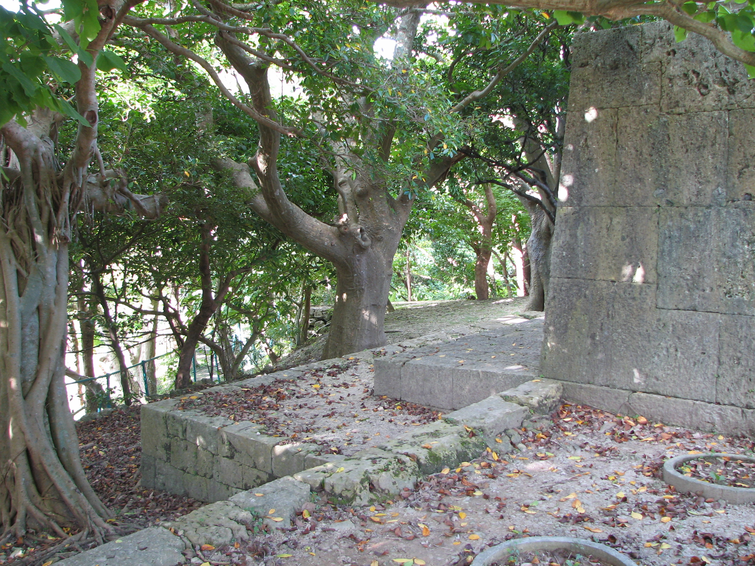 Sonohyan-utaki, Naha, Okinawa, Japan 園比屋武御嶽（沖縄県那覇市）